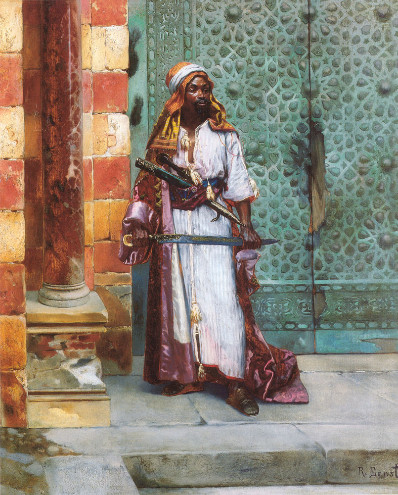 Standing Guard